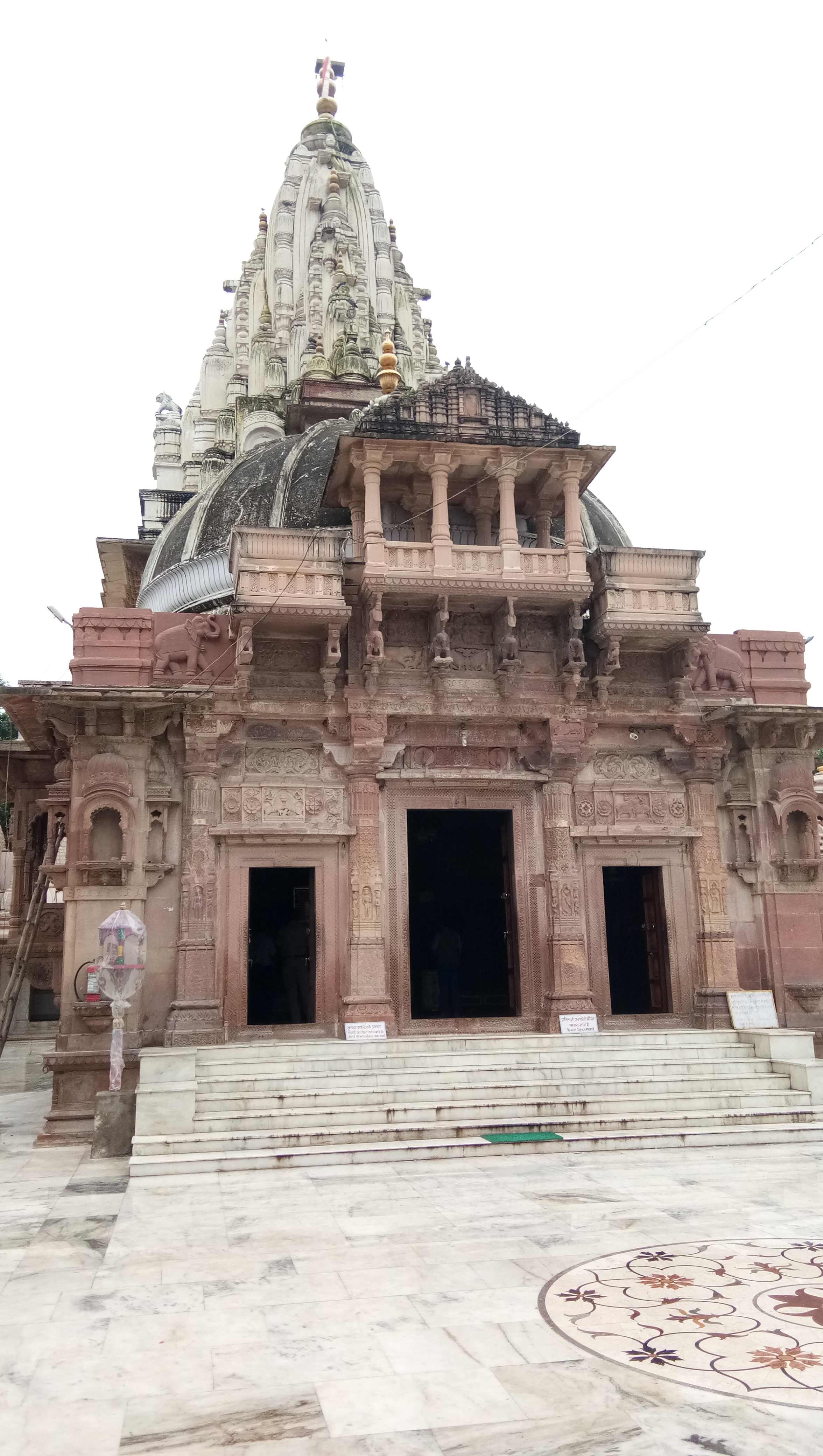 जैन तीर्थ मक्षी जी 2500 वर्ष पुराना है, मंदिर का वर्तमान स्थापत्य 700 वर्ष पुराना होकर सल्तनत कालीन है और राजा सम्प्रति द्वारा जैन तीर्थंकर आदिनाथ जी को समर्पित है